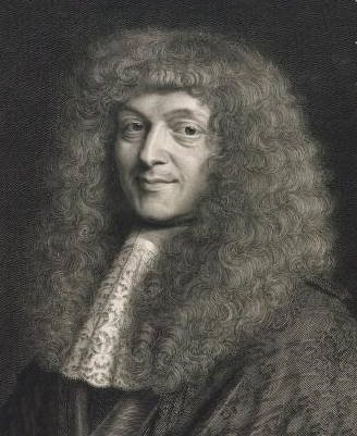 Gravure de Nanteuil (XVIIe s.) Photo de Rémi Mathis